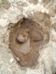 Դամբարան մեկ